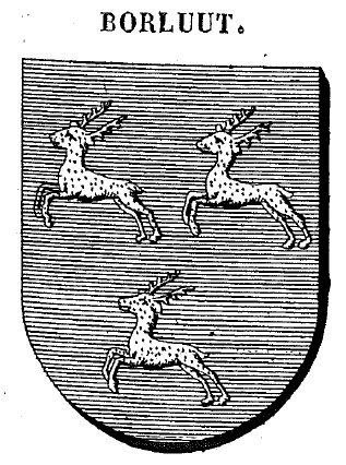 Wapens